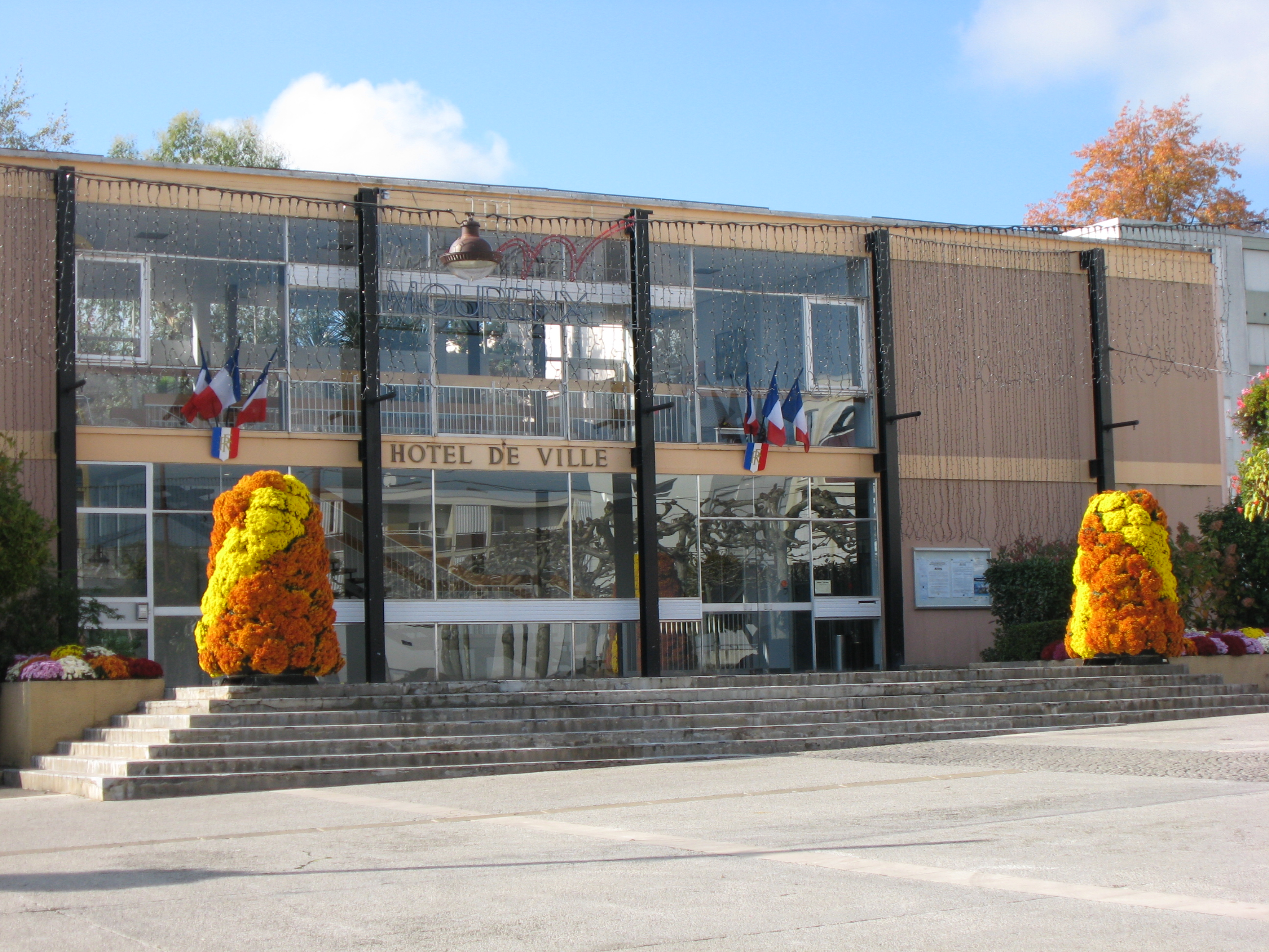 Mairie de Mourenx (Pyrénées Atlantiques) Pyrénées).